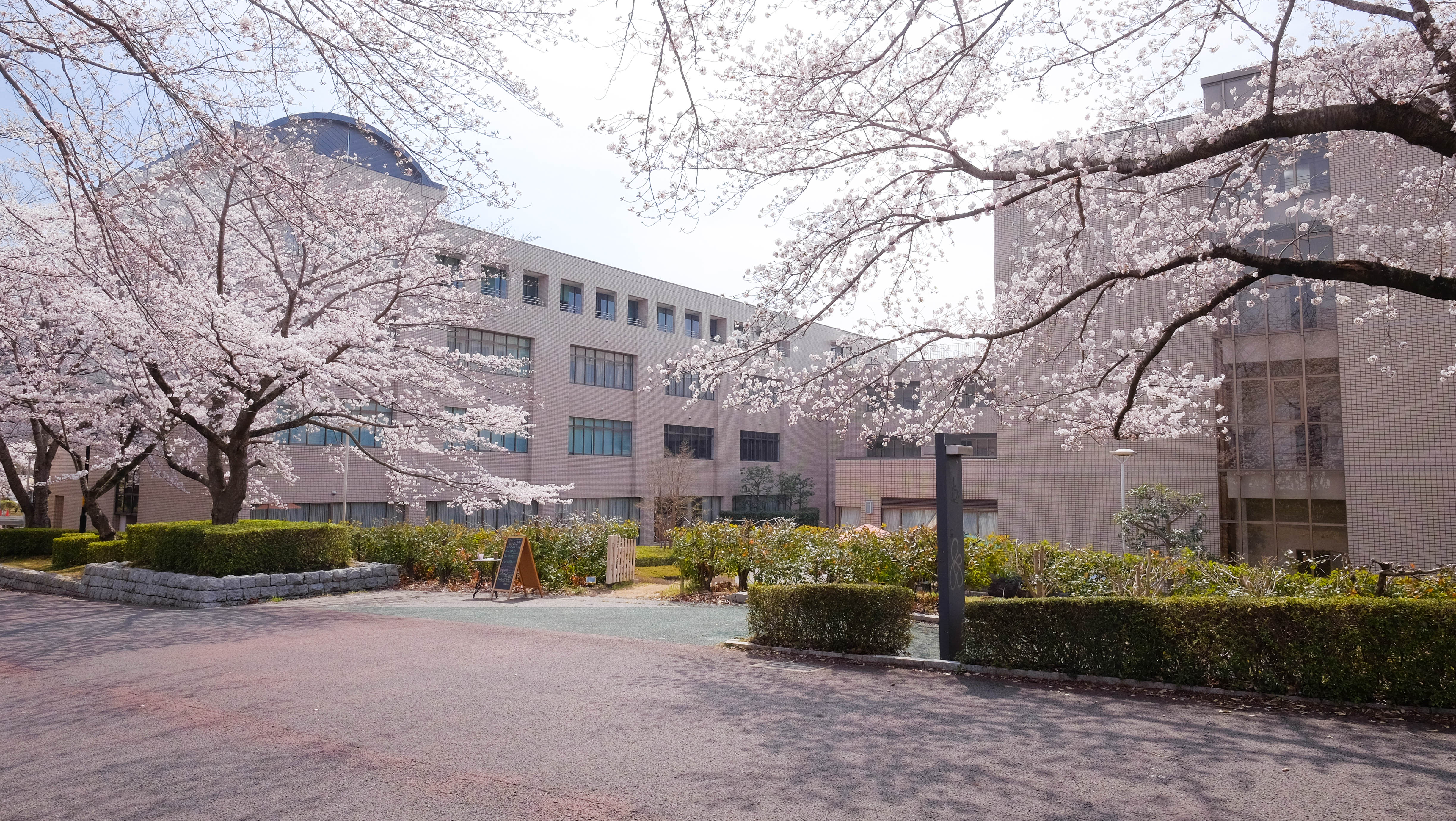 筑波学院大学